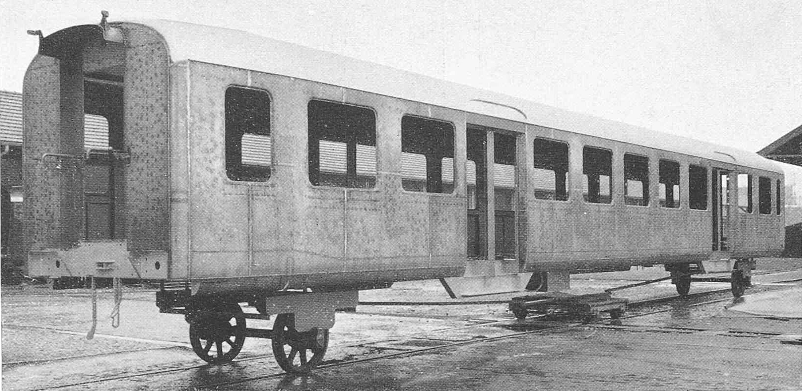 Im Rohbau fertiggestellter selbsttragender Wagenkasten eines SBB-Leichtstahlwagens auf Stützrollen